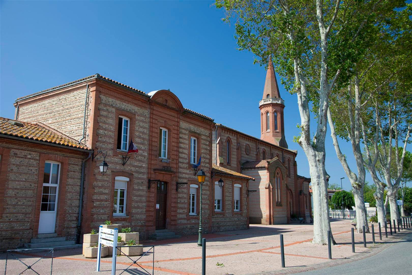 vue de la Mairie et de l'Eglise